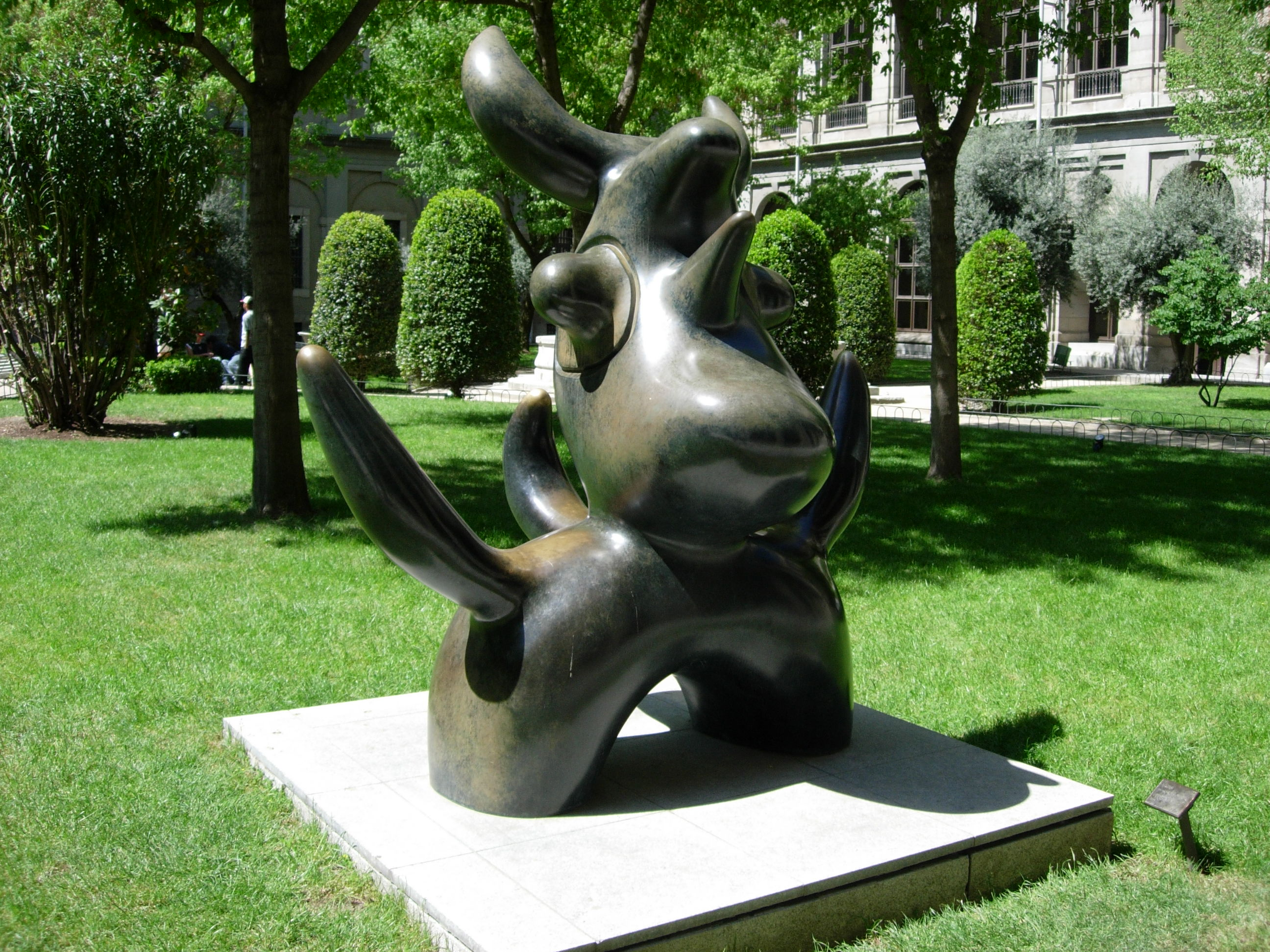 Joan Miro's sculpture, MADRID.